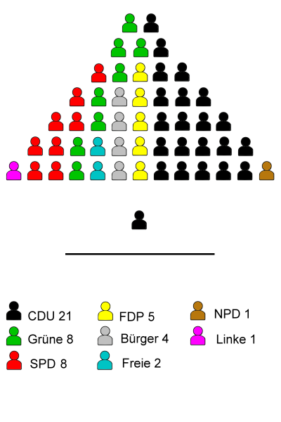 Sitzverteilung im Rat der Stadt Erkelenz 2009